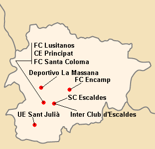 Répartition des clubs de Divisio 1A 2000-2001.